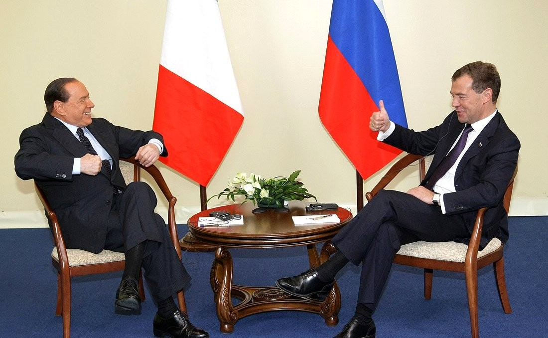 ЯРОСЛАВСКАЯ ОБЛАСТЬ, Ярославль. Дмитрий Медведев с Председателем Совета министров Итальянской Республики Сильвио Берлускони.